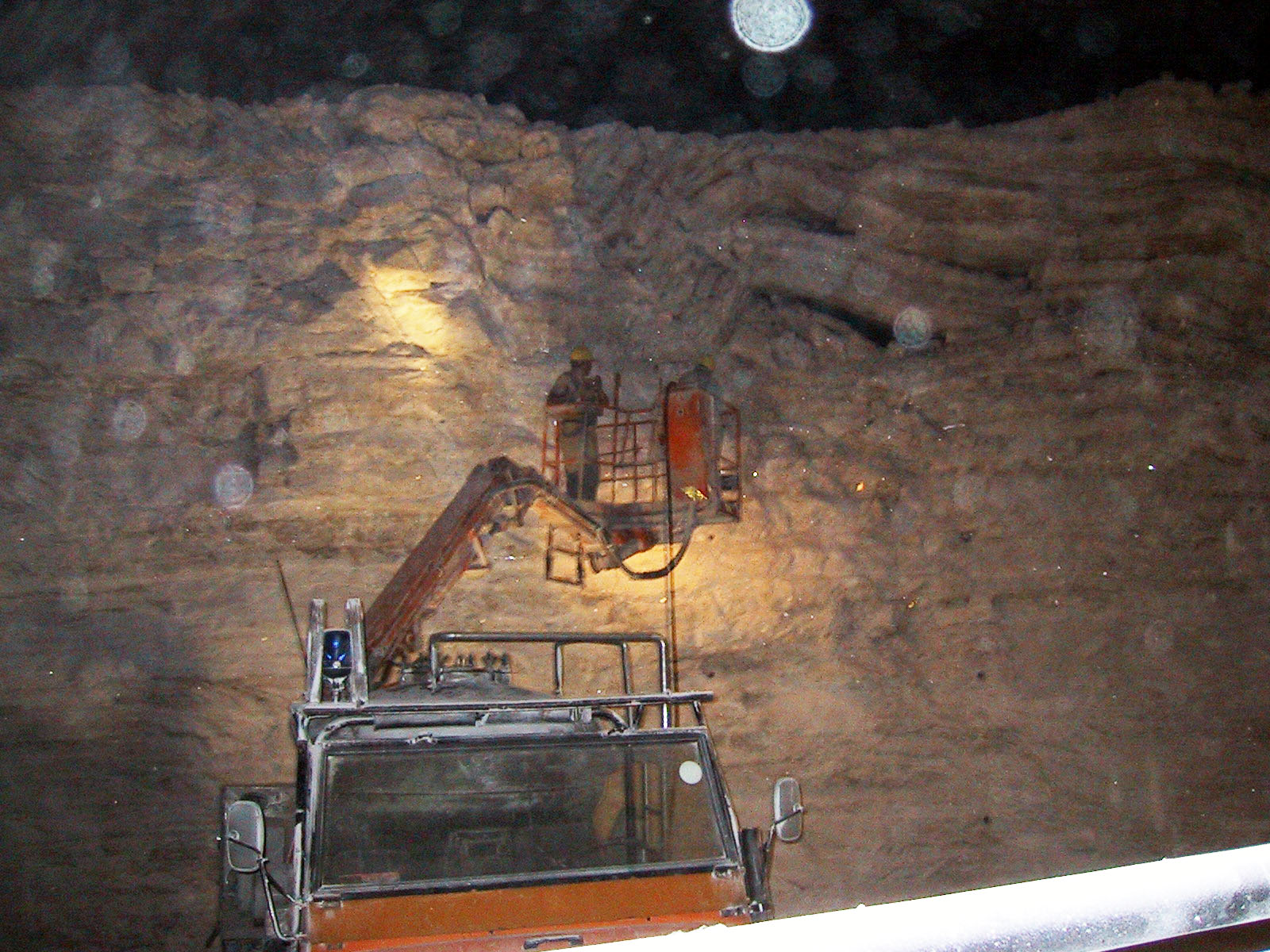 Abbau von Steinsalz in einem Bergwerk Digging rock salt in a mine Date: October 2001, Rheinberg (Kreis Wesel), Germany Author: Maschinenjunge Licence: see below. Salz